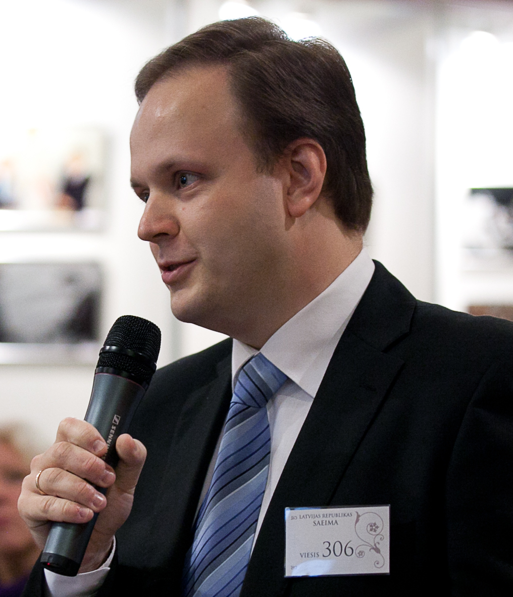 2011.gada 2.septembris. Publiskā diskusija “Iedzīvotāju elektroniski pausto iniciatīvu izskatīšana Saeimā”. Foto: Ernests Dinka, Saeimas Kanceleja